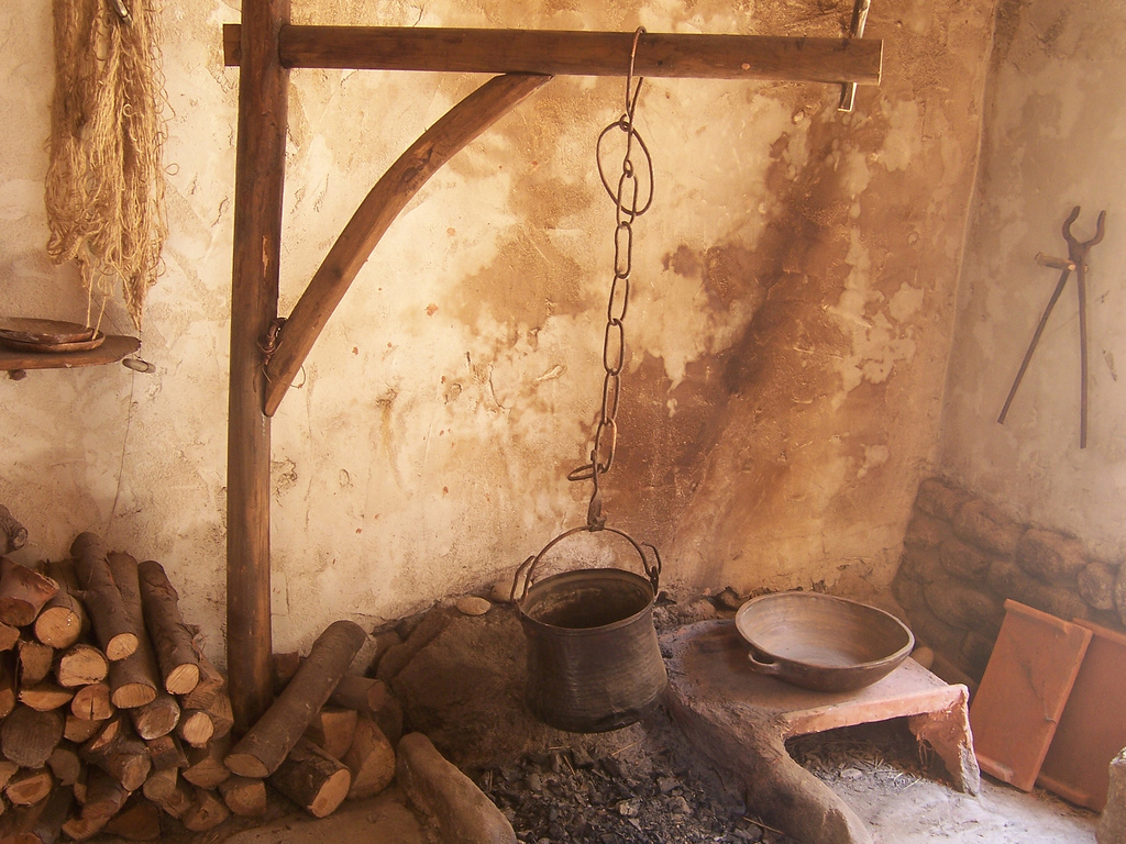 Detalle del interior de la vivienda/almacén romanizada.